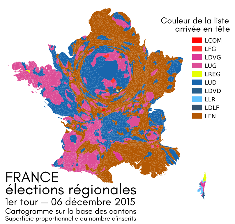 Cartogramme des résultats des élections régionales françaises. 1er tour — 06 décembre 2015. Cartogramme sur la base des cantons : superficie proportionnelle au nombre d'inscrits. Version PNG. Voir aussi en vectoriel File:Cartogramme résultats régionales 2015 tour 1 par canton.svg